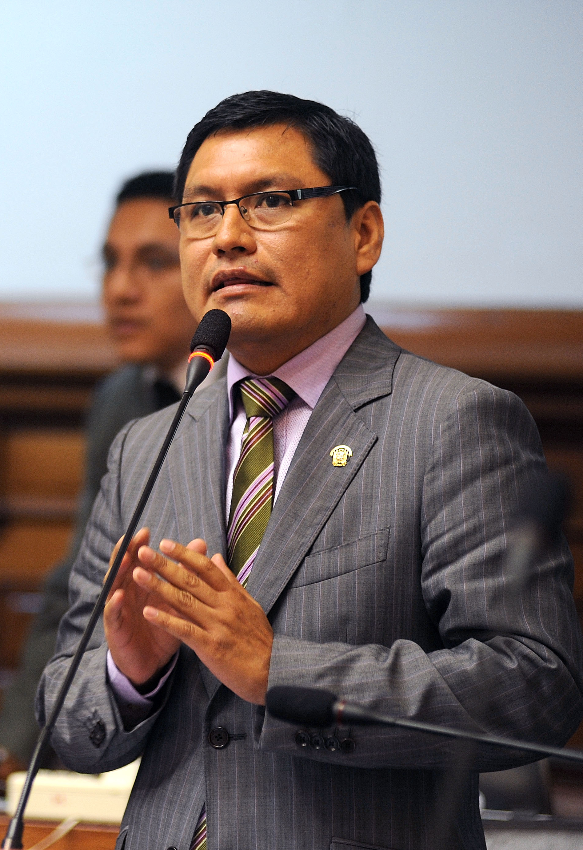 El legislador Alberto Escudero Casquino expresa su posición en el debate parlamentario realizado esta tarde por el Pleno congresal